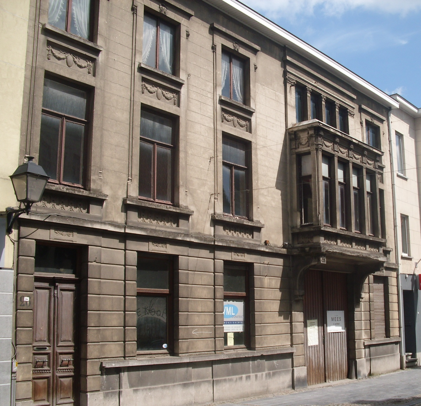 De voorgevel van Brouwerij Dugardein in de Broodstraat - Oudenaarde - Oost-Vlaanderen - België